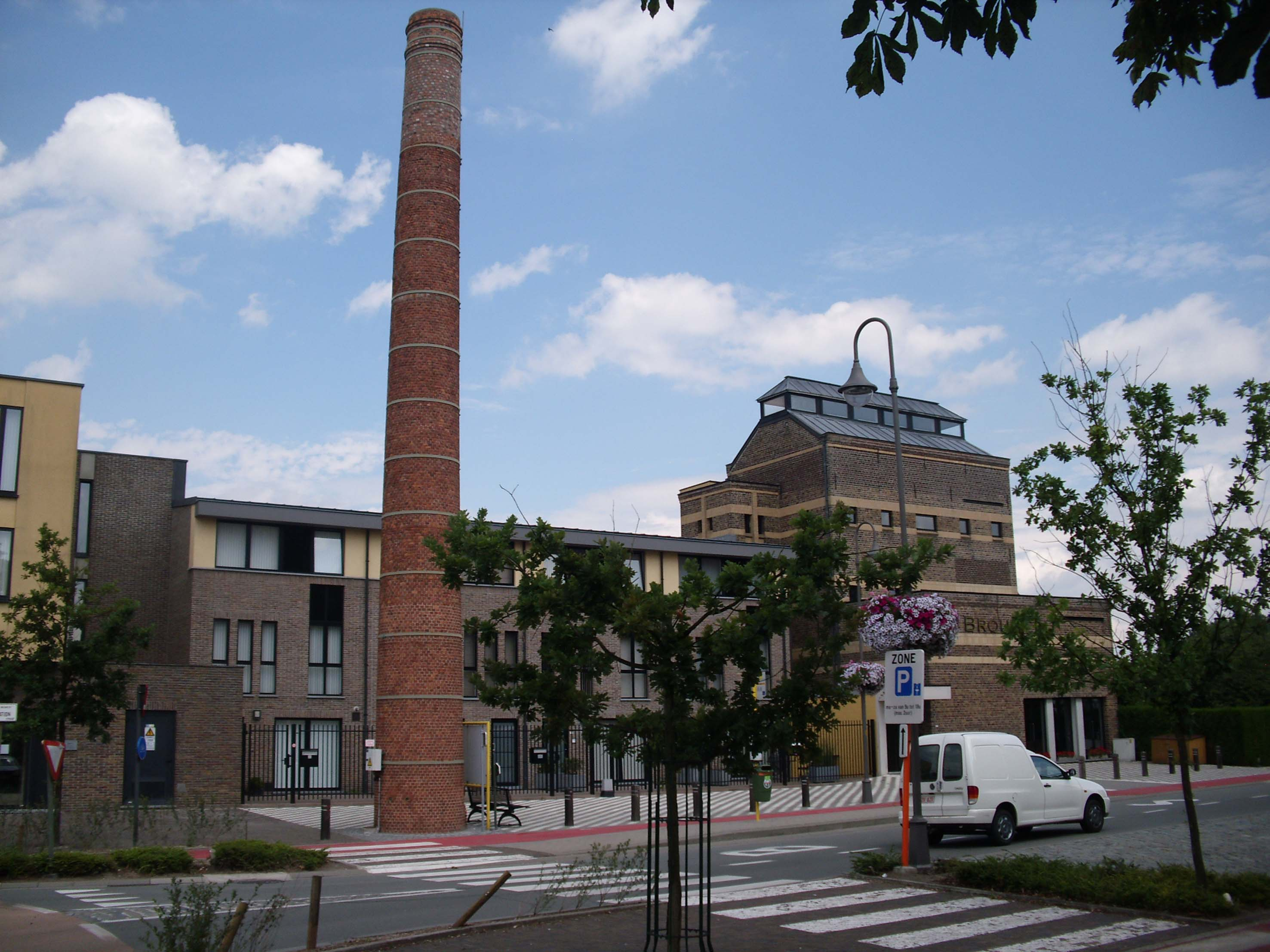 Brouwerij Ide (1872-1981) - Stationsstraat - Eke - Nazareth - Oost-Vlaanderen - Vlaanderen - België Na de sluiting werd ze omgebouwd tot het socio-cultureel centrum van Nazareth (Eke).